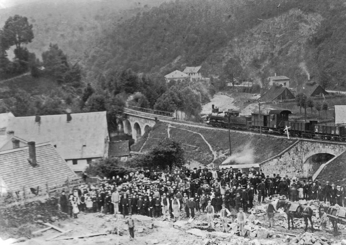 Grundsteinlegung (31. Juli 1891) Erlöserkirche in Schalksmühle neben der Staatsbahnstrecke Hagen/Dieringhausen (Bildmitte).